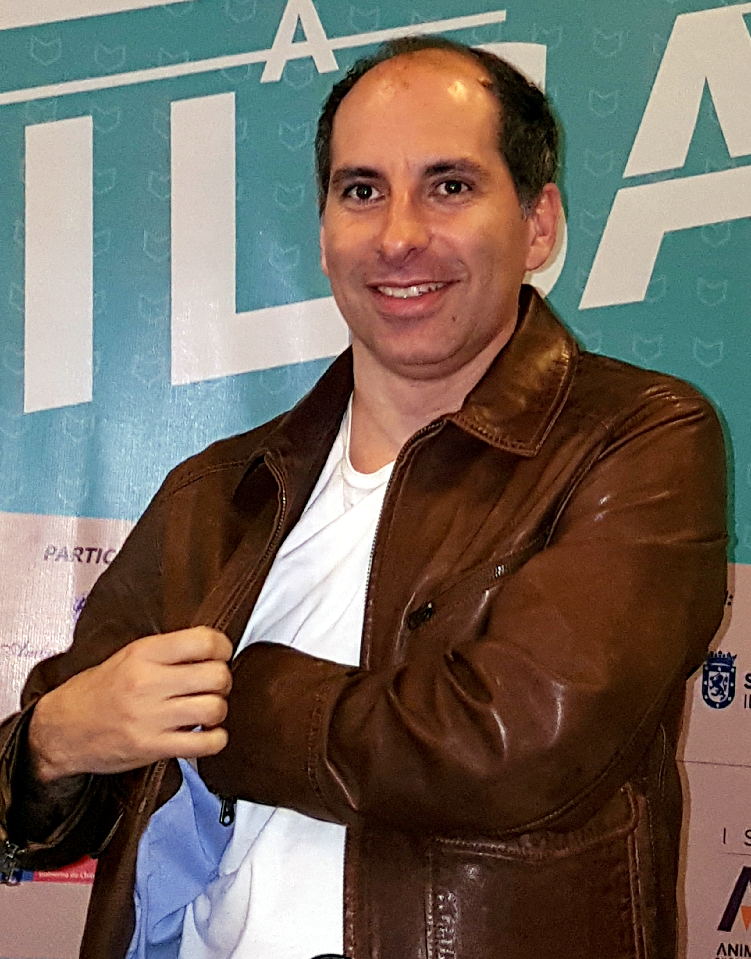 El poeta e ingeniero civil Juan Cristóbal Romero en la Feria Internacional del Libro de Santiago 2017.